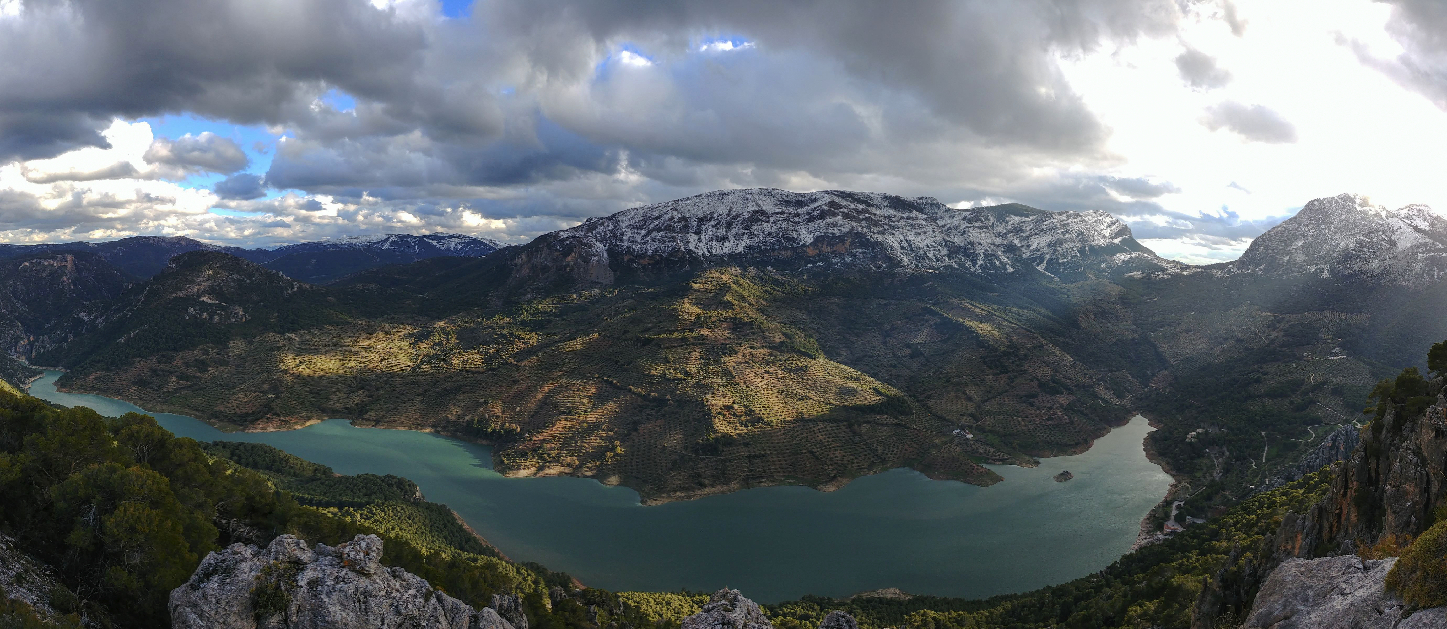 Vista panorámica del embalse del Quiebrajano desde Matamulos.